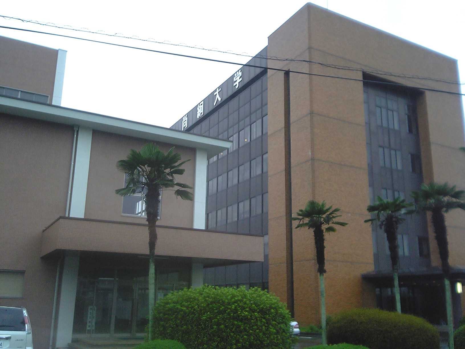 尚絅大学 (2007年7月7日撮影)